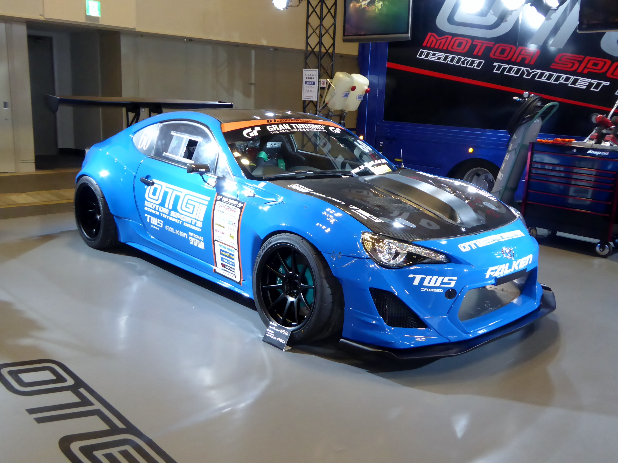 大阪オートメッセ2015においてFALKEN PETRONAS OTG 86を撮影。